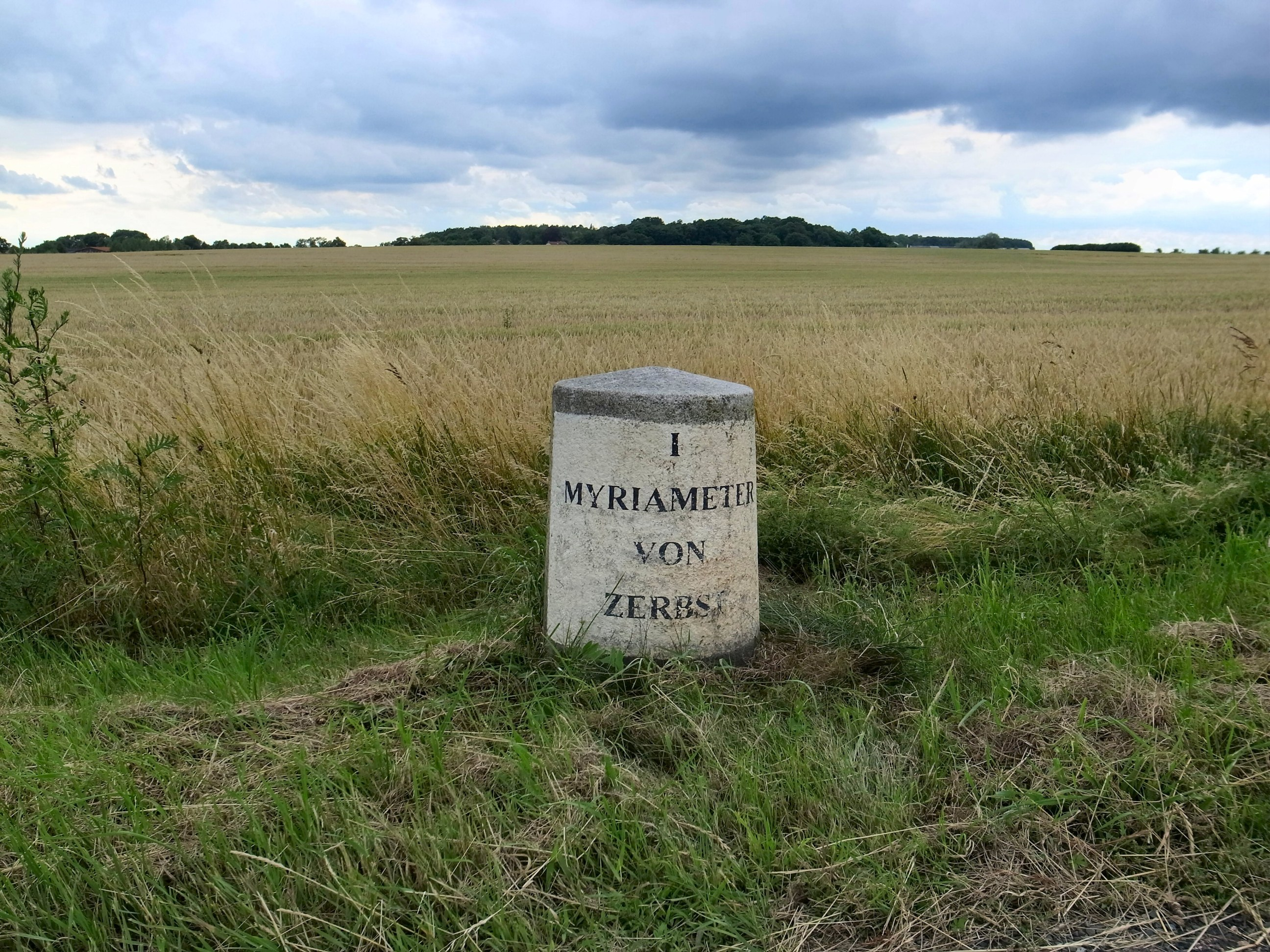 Steutz, Anhaltischer Meilenstein I Myriameter von Zerbst